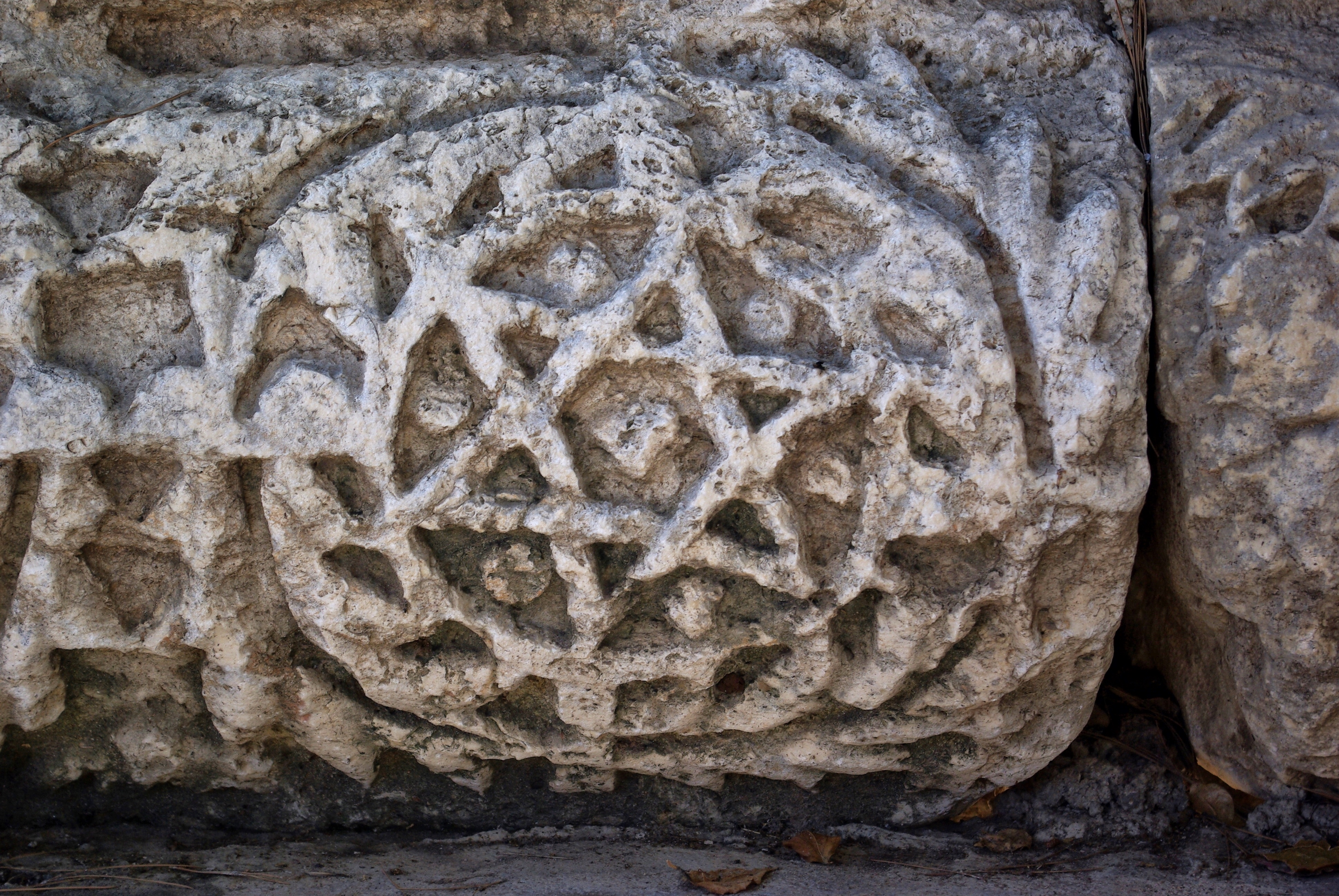 Kafarnaum